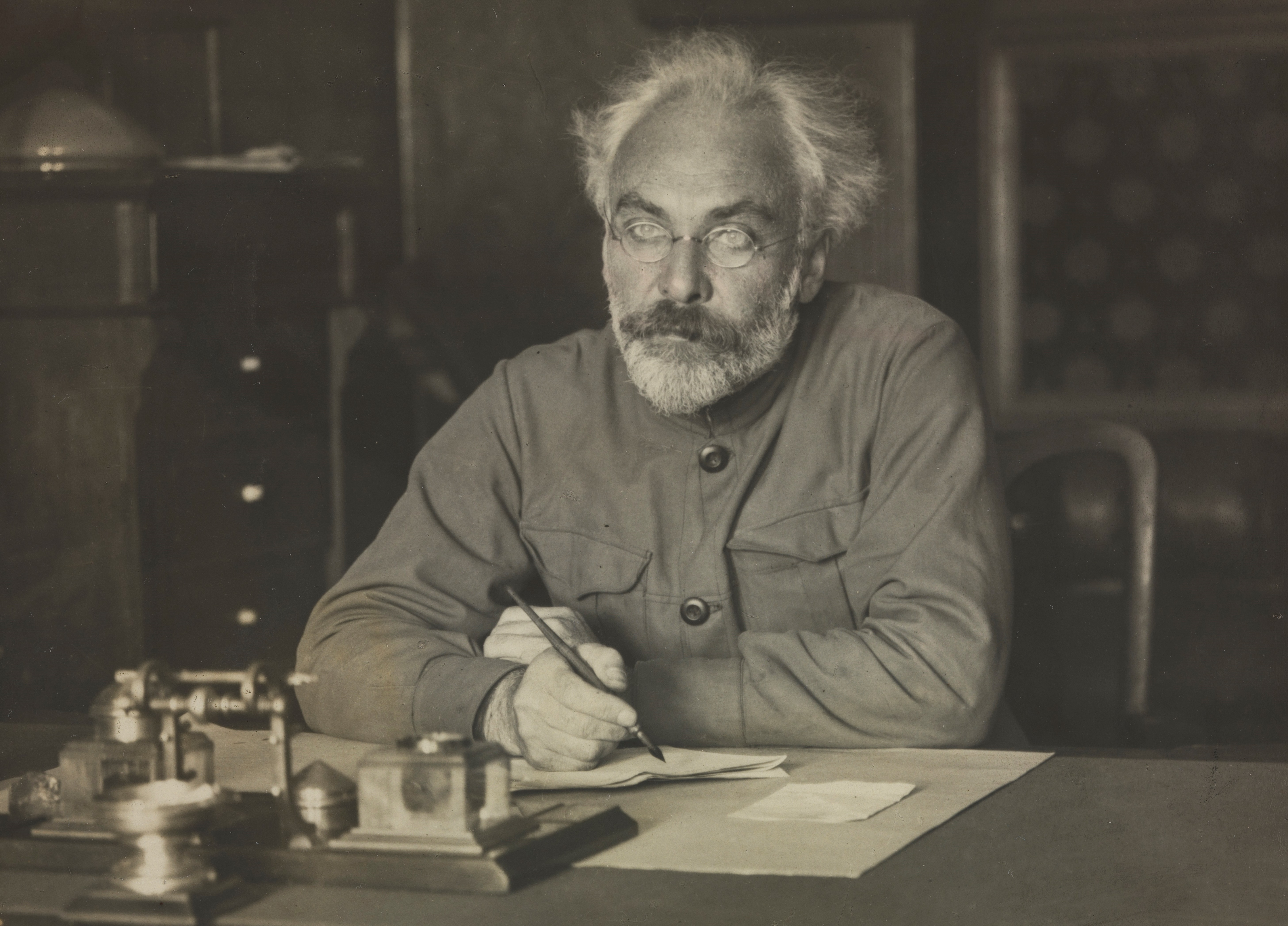 Smidovitsj, presidiummedlem i V21K i Sovjetunionen. Depicted person: Smidovitsj Depicted place: Russland, Moskva Смидович, Пётр Гермогенович; Pyotr Smidovich